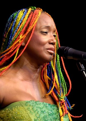 Lucrècia